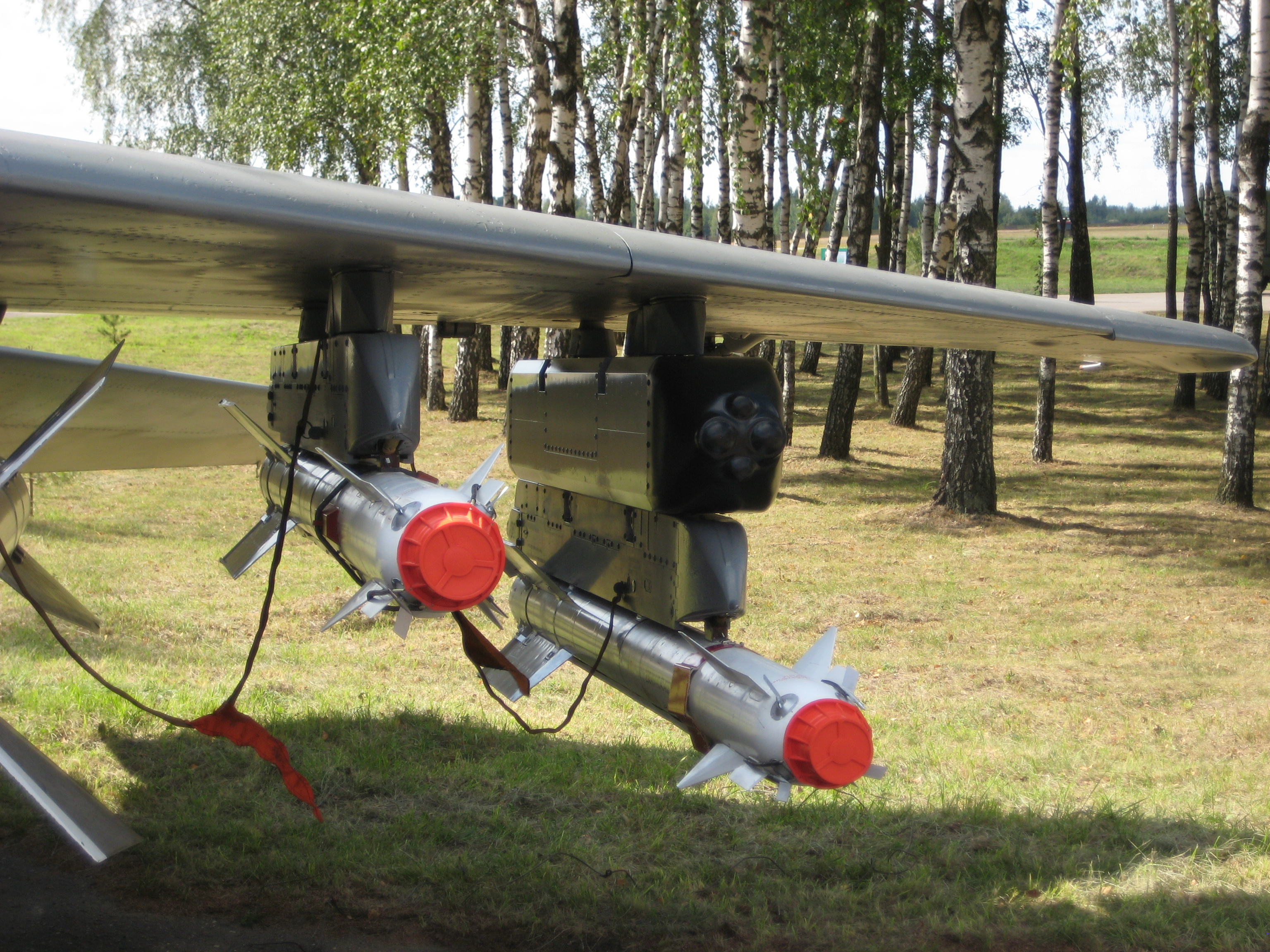 Talisman to air-to-air missiles